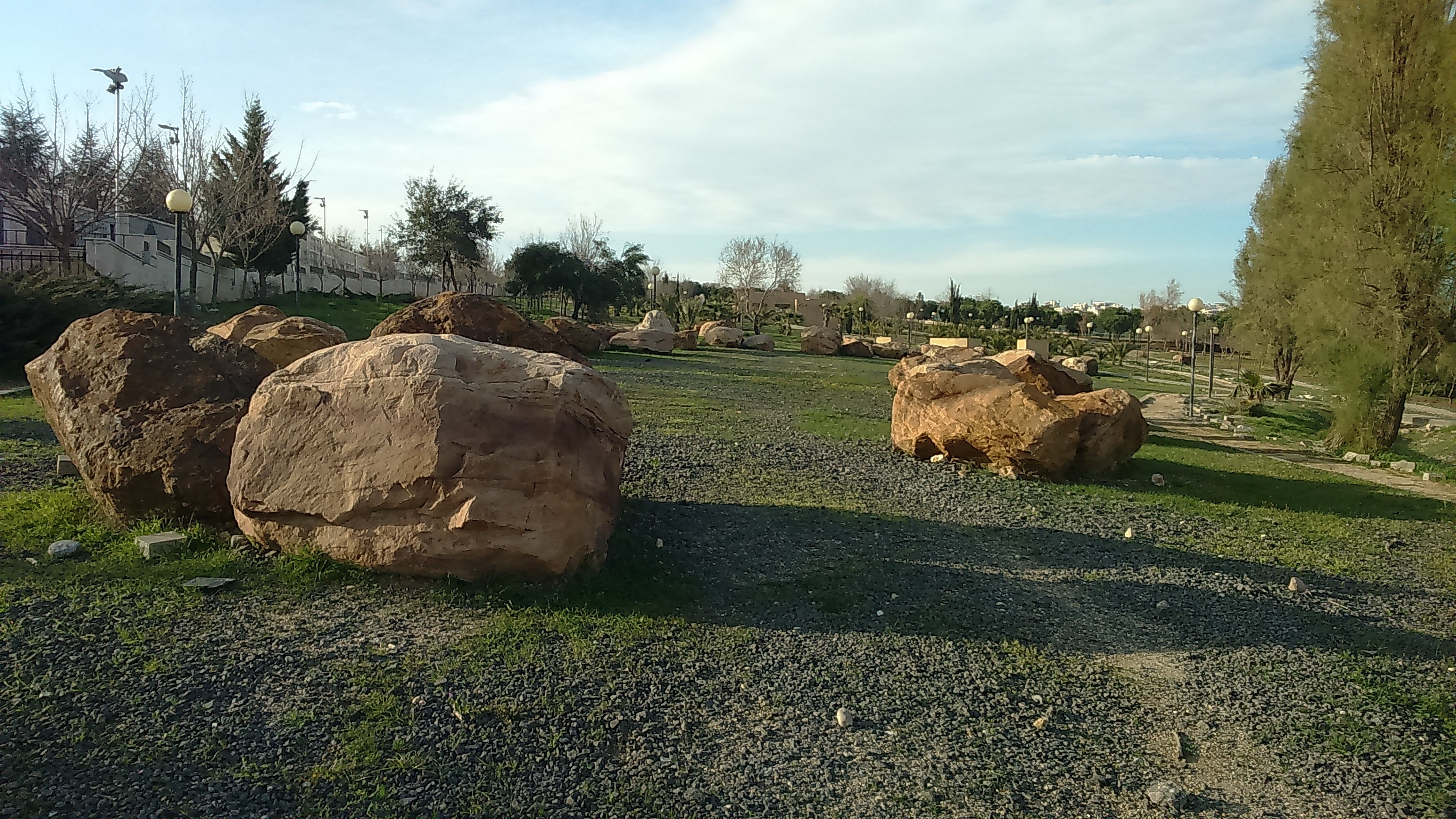 Park in Amman, Jordan